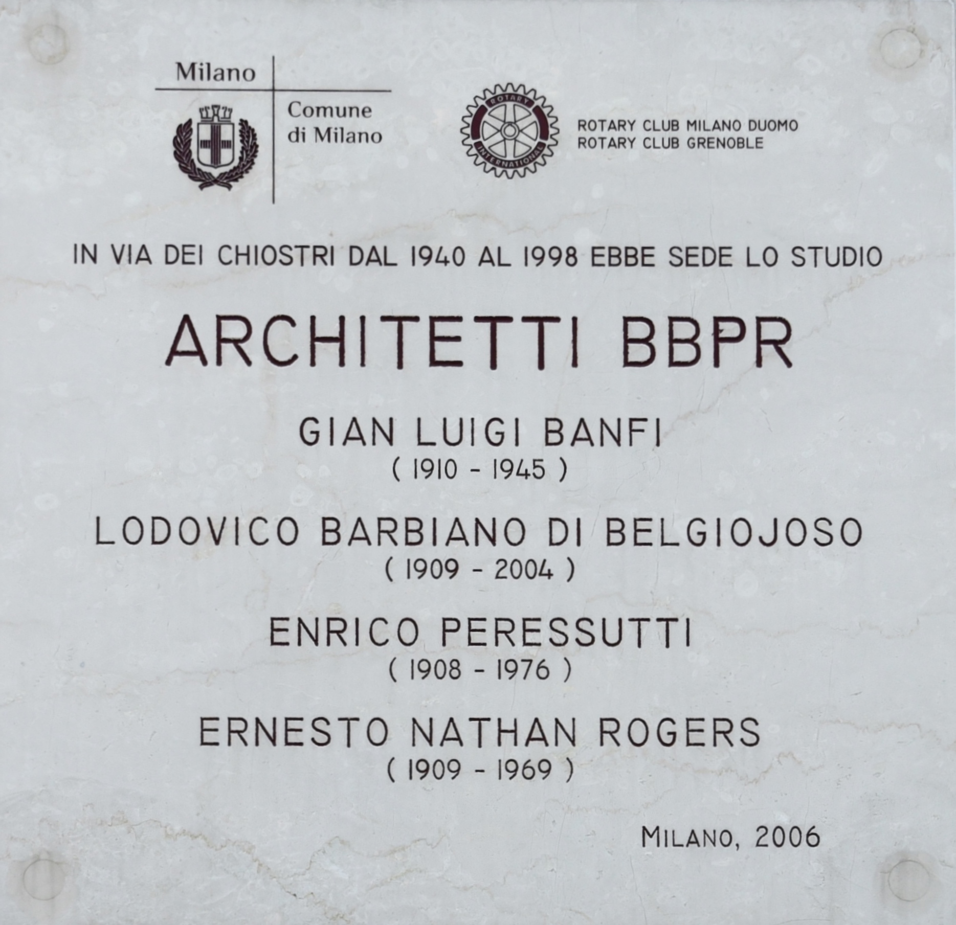 Gedenktafel Architetti BBPR: Gian Luigi Banfi, (1910 - 1945), Lodovico Barbiano Di Belgiojose (1909 - 2004), Enrico Peressutti (1908 - 1976), Ernesto Nathan Rogers (1909 - 1969)